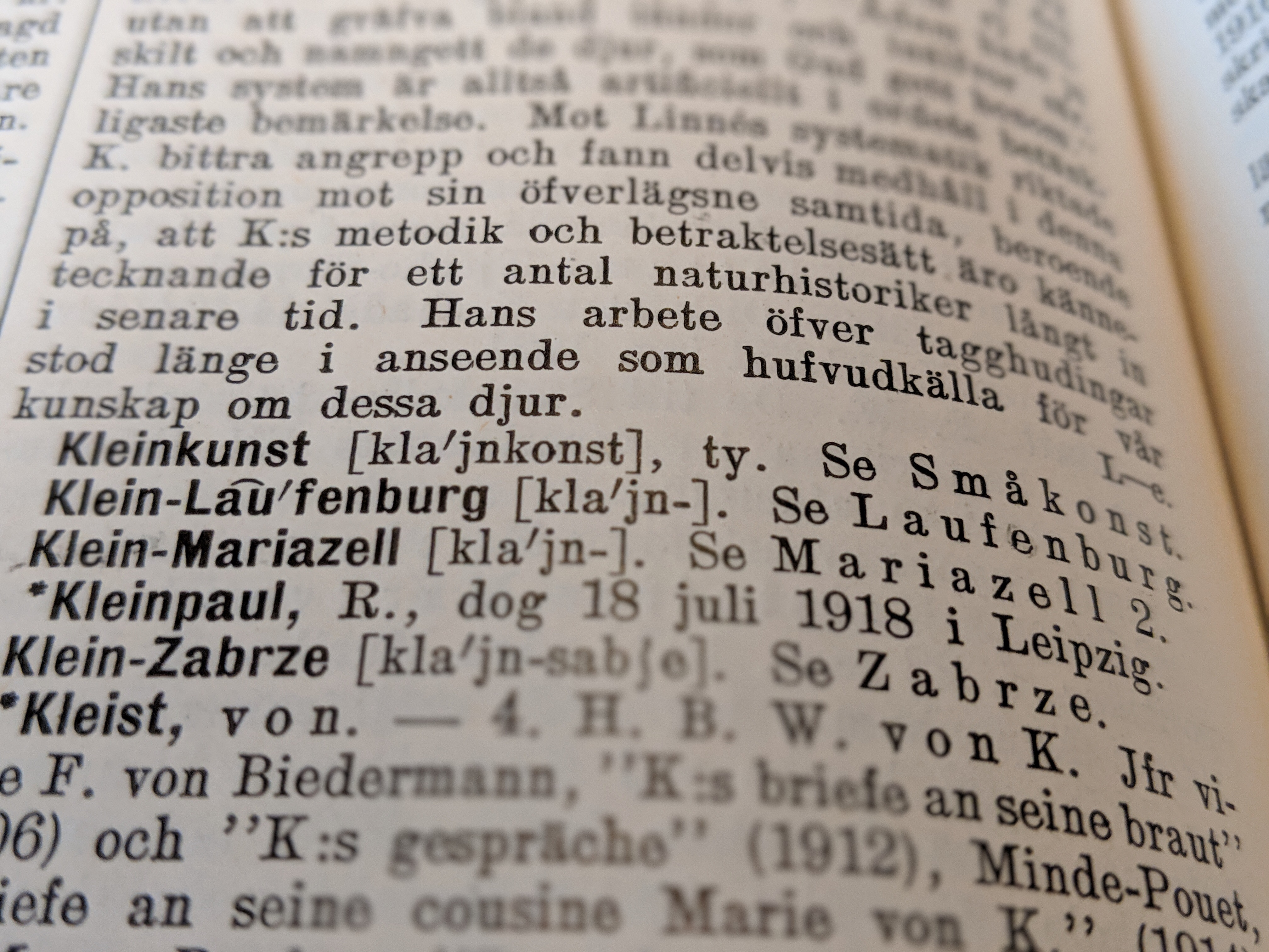 Der Begriff „Kleinkunst“ in einem schwedischen Konversationslexikon